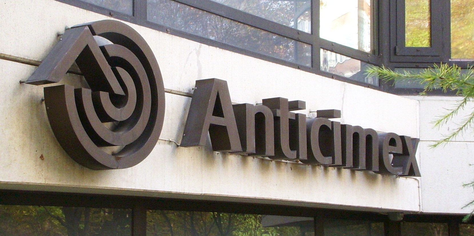 Anticimex huvudkontor i Gröndal, arkitekt Sten Samuelson